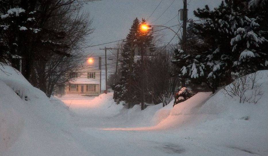 Le village de Saint-Alexandre-de-Kamouraska, un soir où une tempête de neige bloquait complètement les routes vers l'est du Québec. Aucun véhicule ne pouvait aller plus loin que Rivière du Loup.